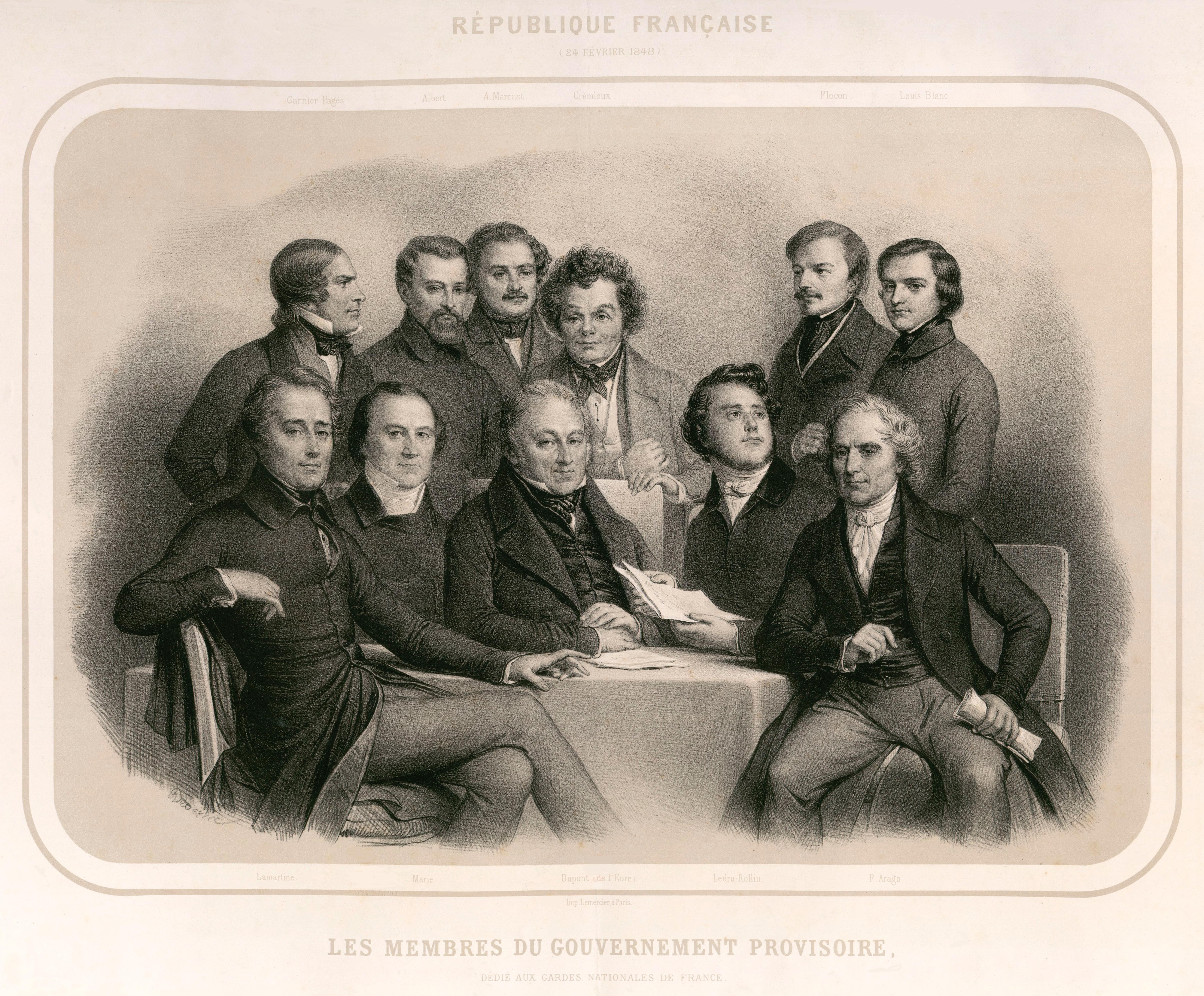 Les membres du Gouvernement provisoire - dédié aux gardes nationales de France.